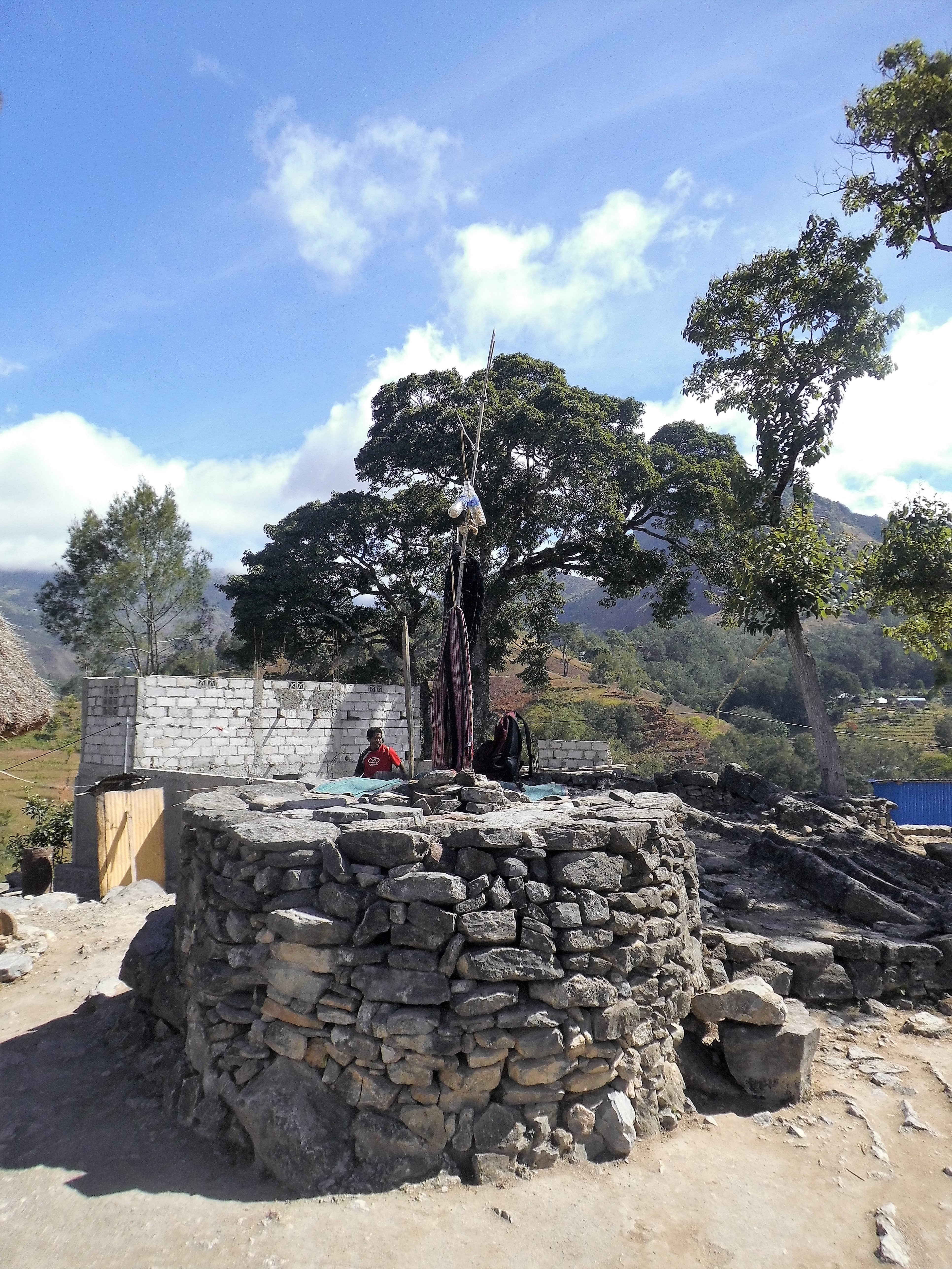 Animistischer Altar in Maubisse